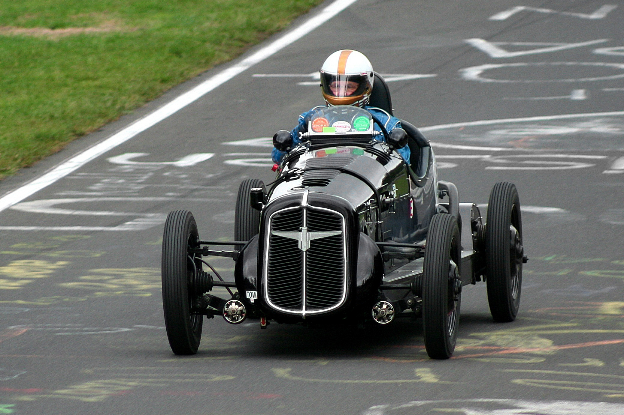 Adler Trumpf Junior Einsitzer beim Oldtimer Festival auf dem Nürburgring. Vierzylinder-Viertaktmotor, 995 cm³, Frontantrieb, Baujahr 1936